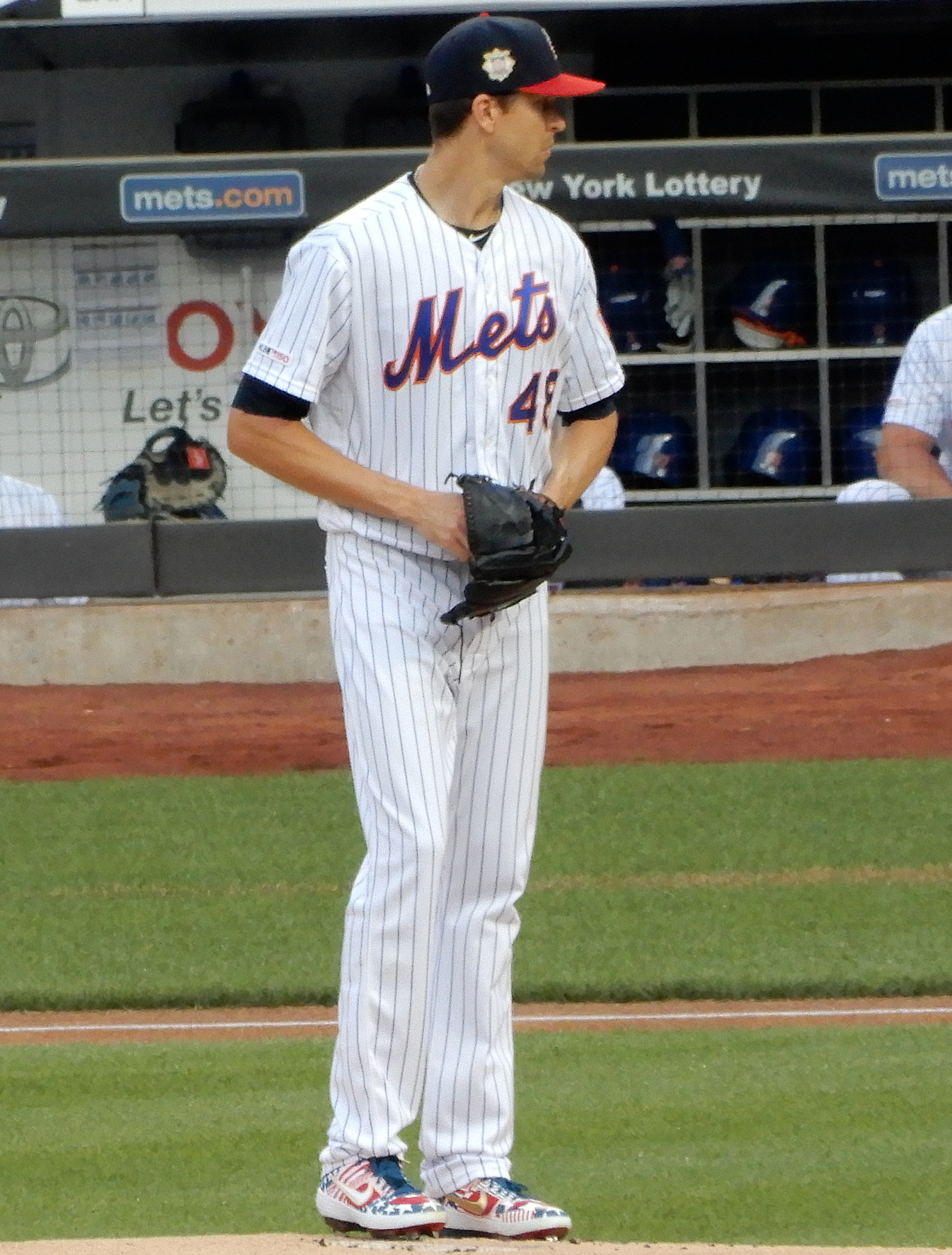 Jacob deGrom